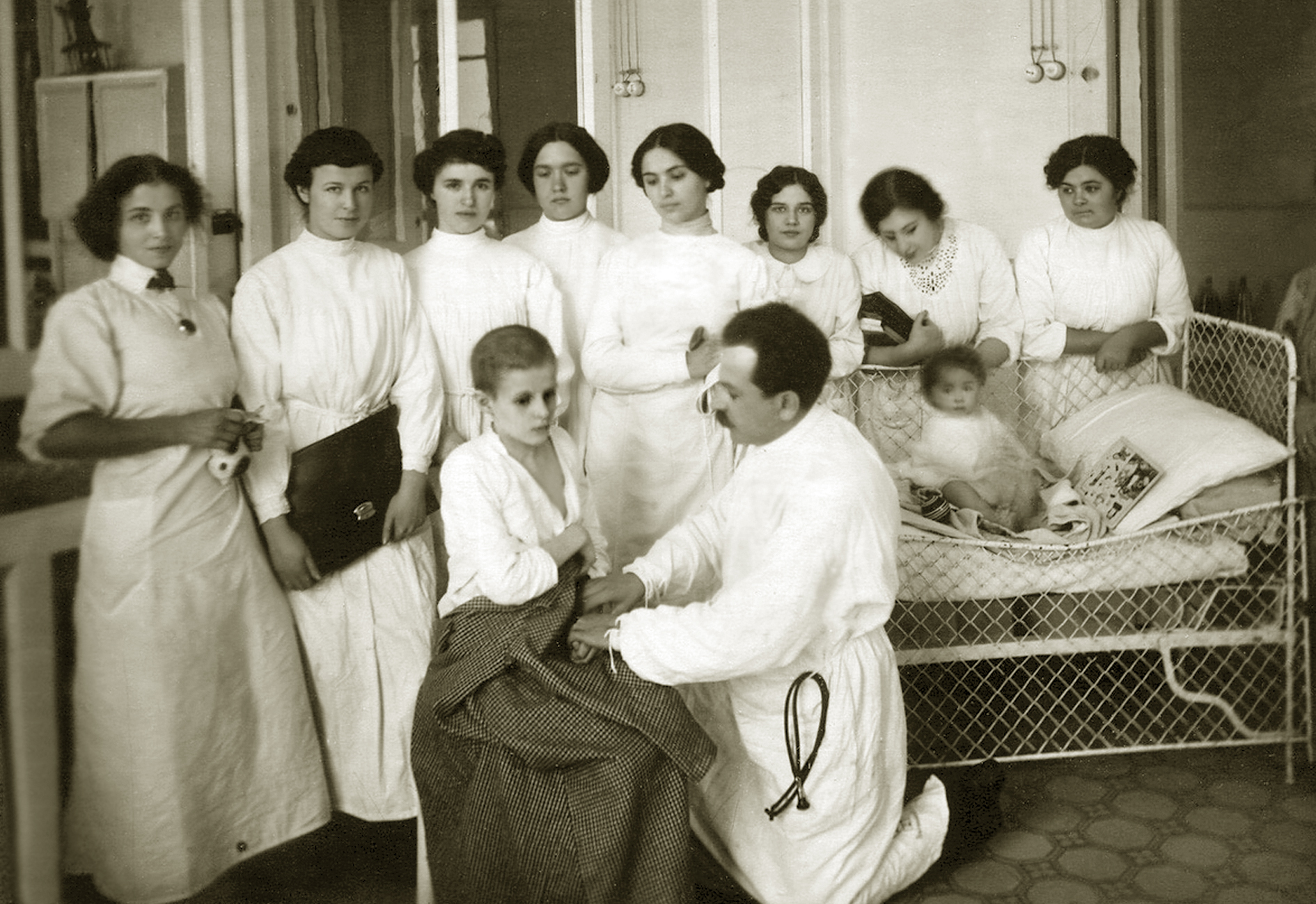 Занятия по педиатрии в Женском медицинском институте СПб. Кафедра профессора Д. А. Соколова.